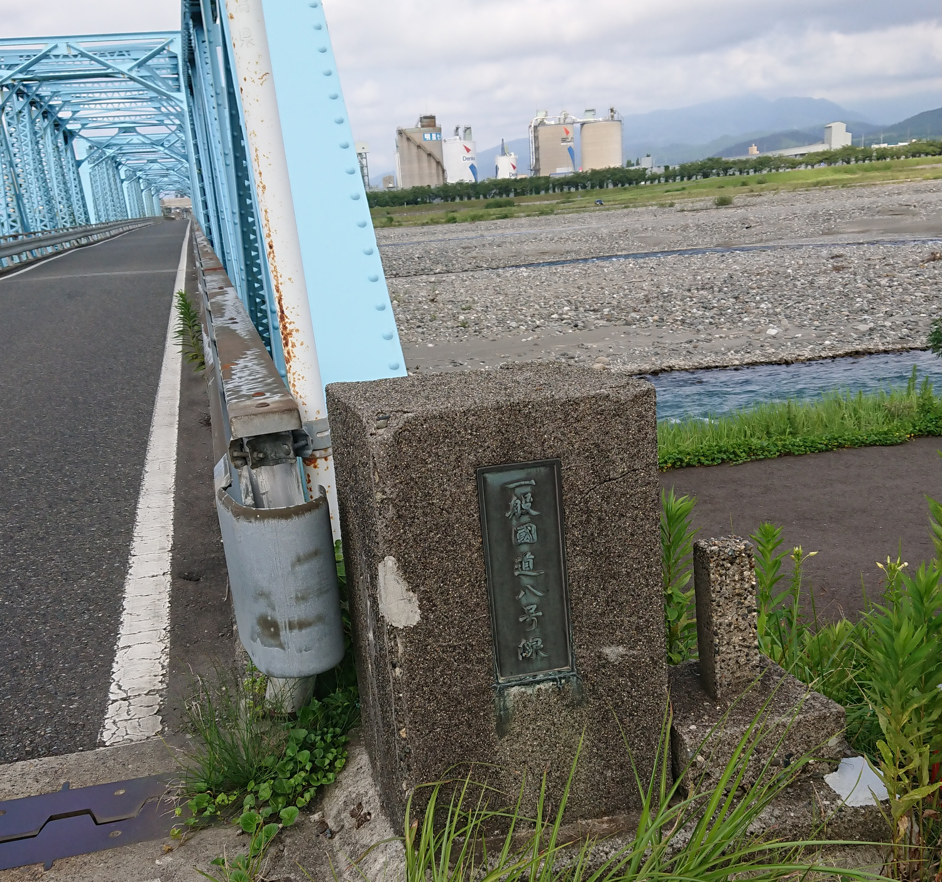 姫川橋を左端より撮影。 新潟県糸魚川市、2020年8月16日。